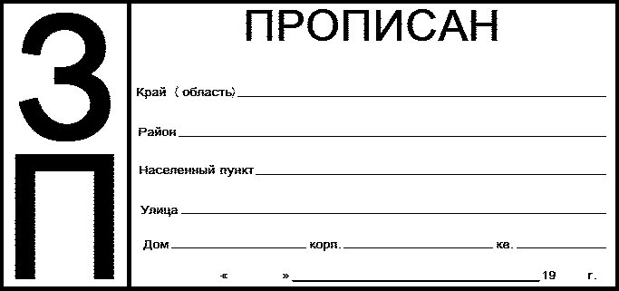 Клише прописка ЗП